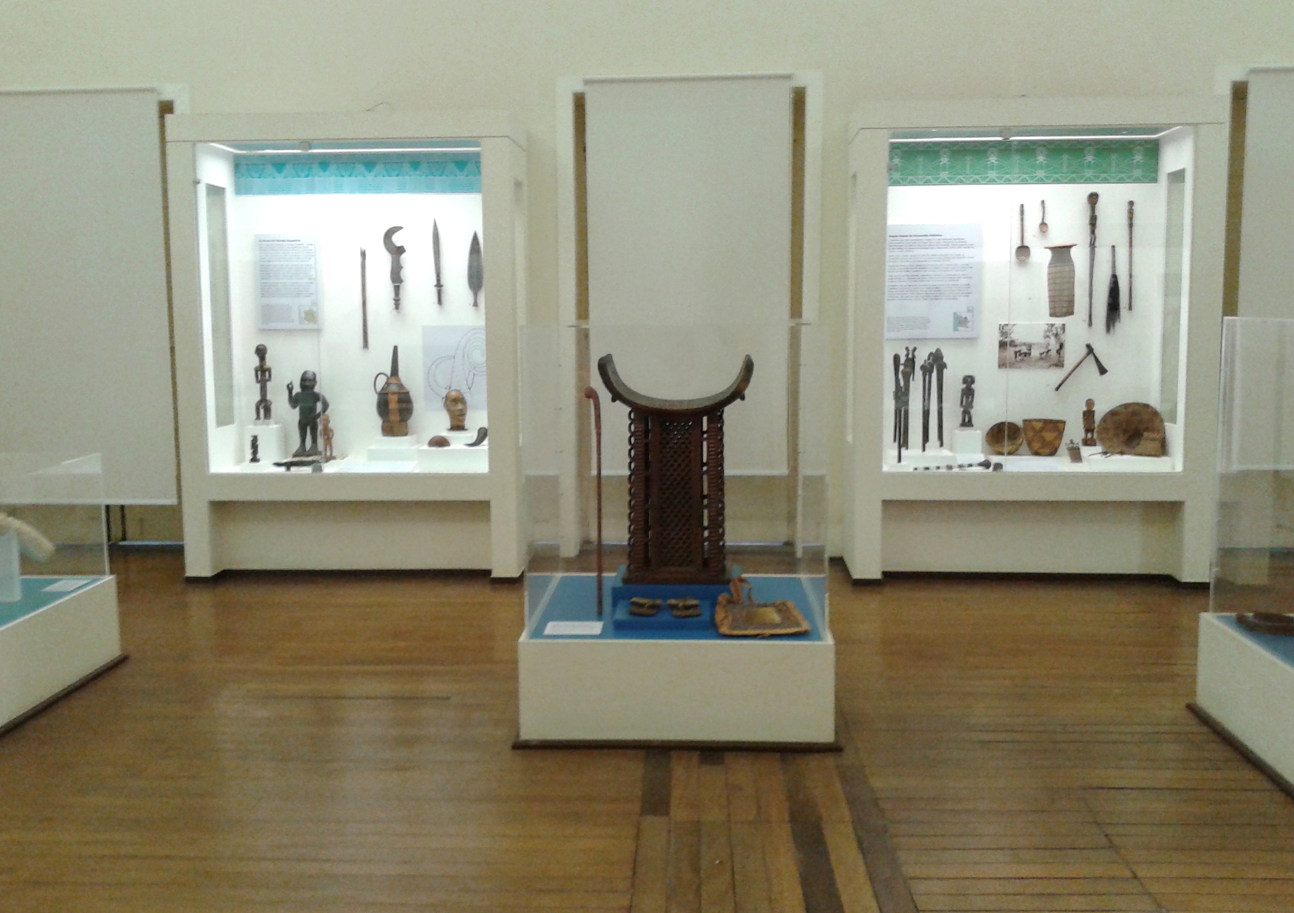 Português do Brasil: Exposição de etnologia africana e afrobrasileira do Museu Nacional/UFRJ - Rio de Janeiro, Brasil.